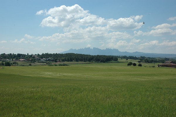 Pla de Bages